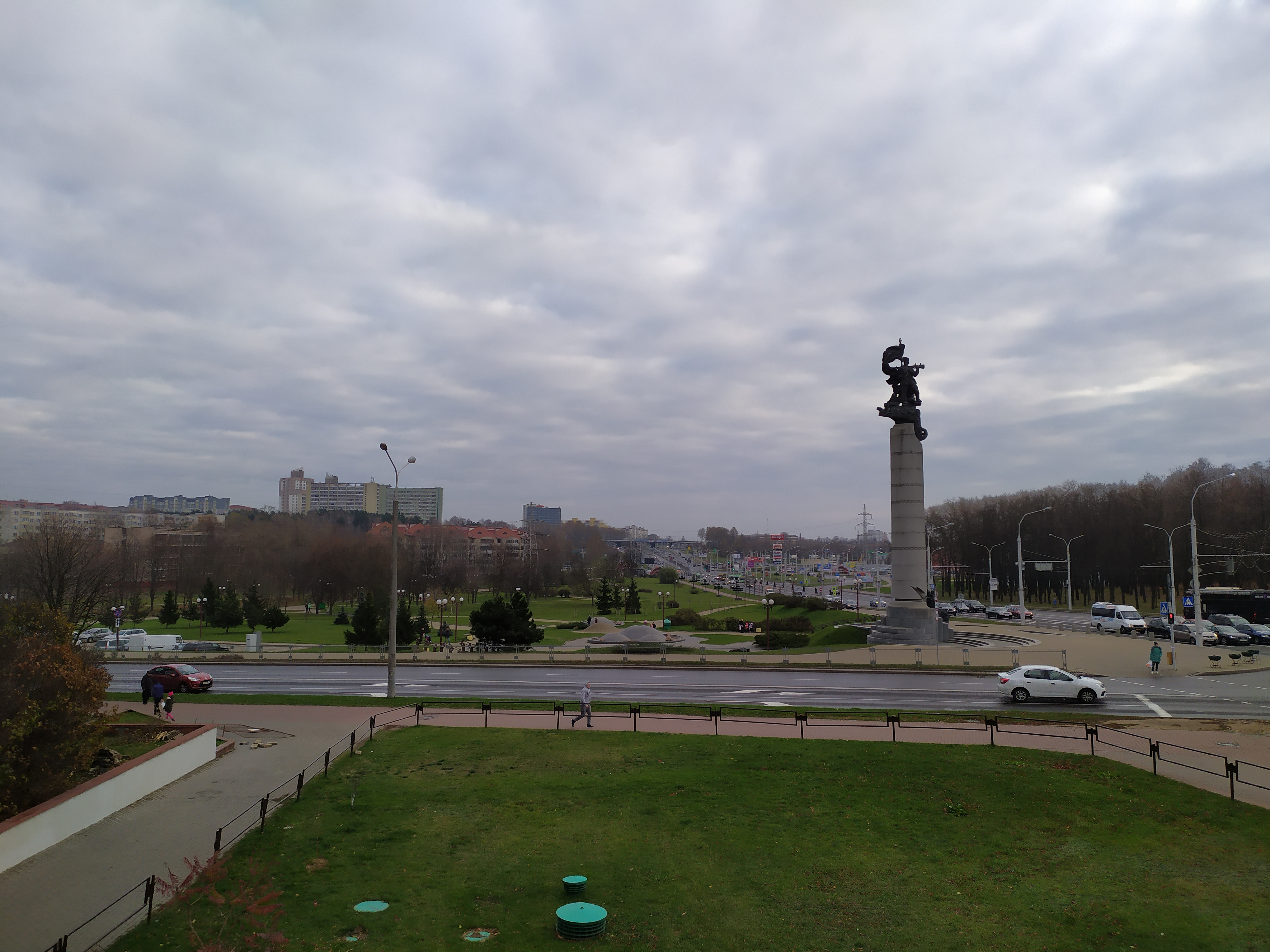 Раён колішняй вёскі Слоўвец, Менск. Сквер «Беларусь партызанская» і вуліца Варвашэні (раней Енісейская).